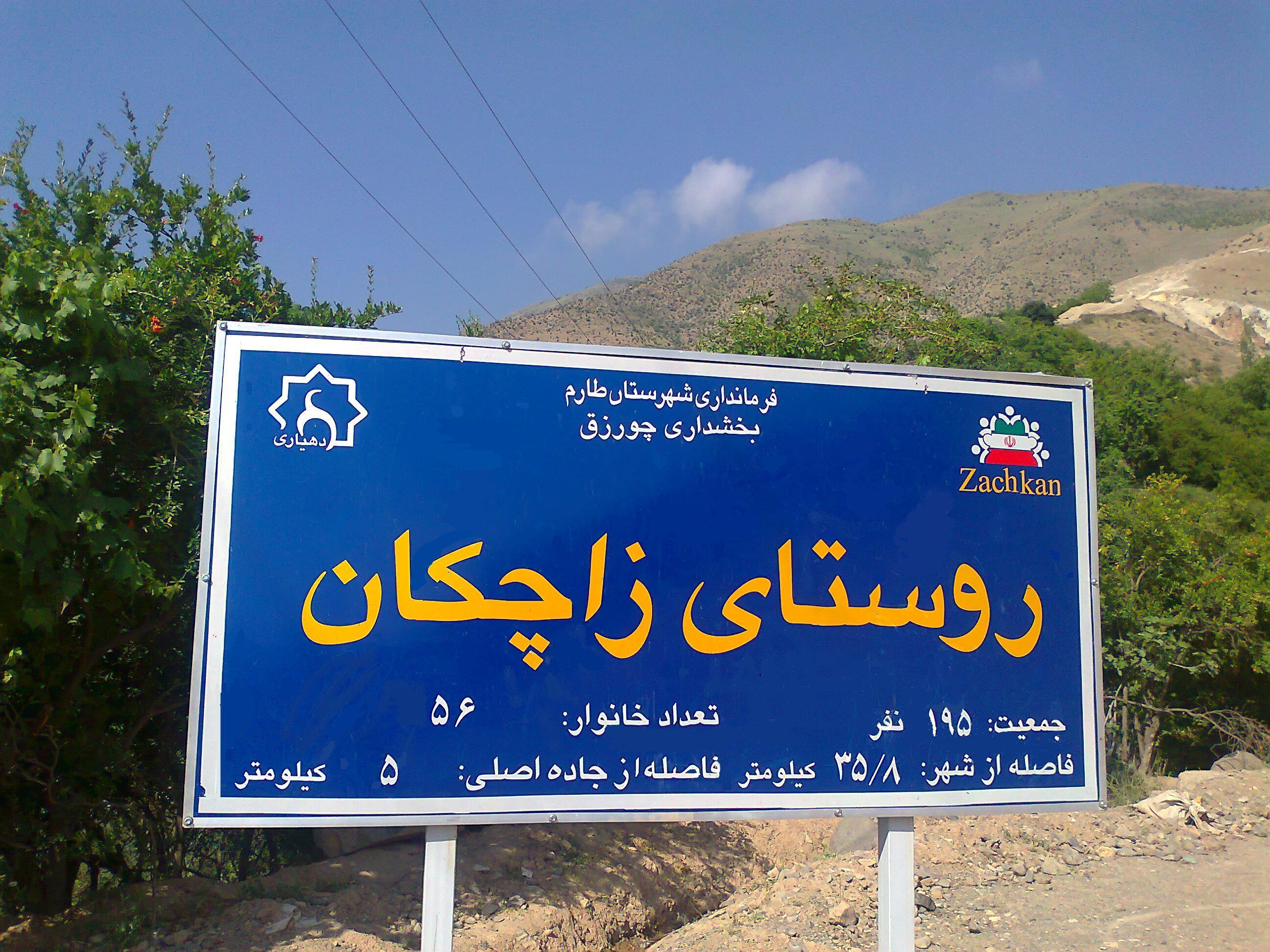 تابلو روستای زاچکان